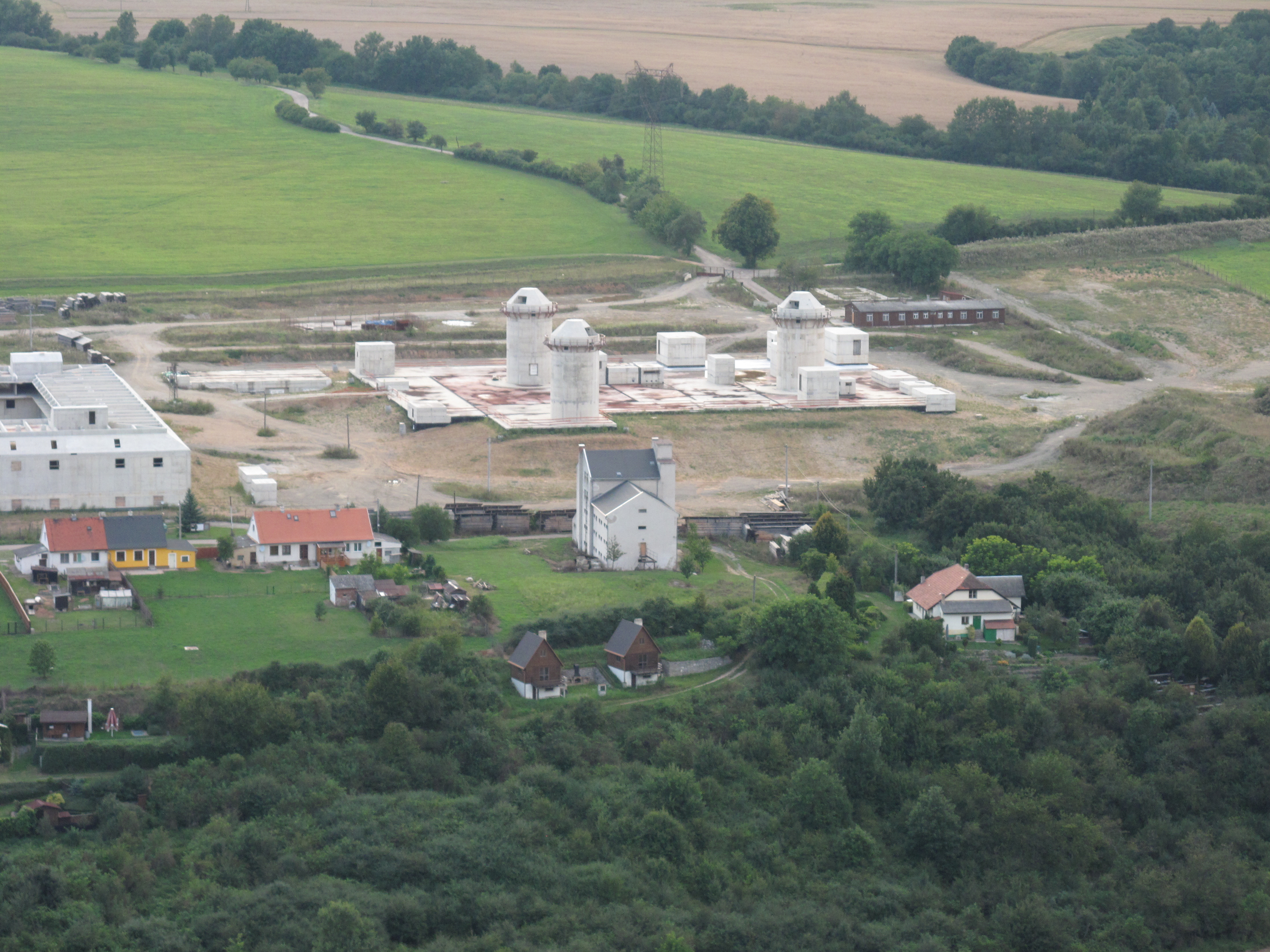 Výstavba Majáku Ptyč. Okres Rokycany, Česká republika.